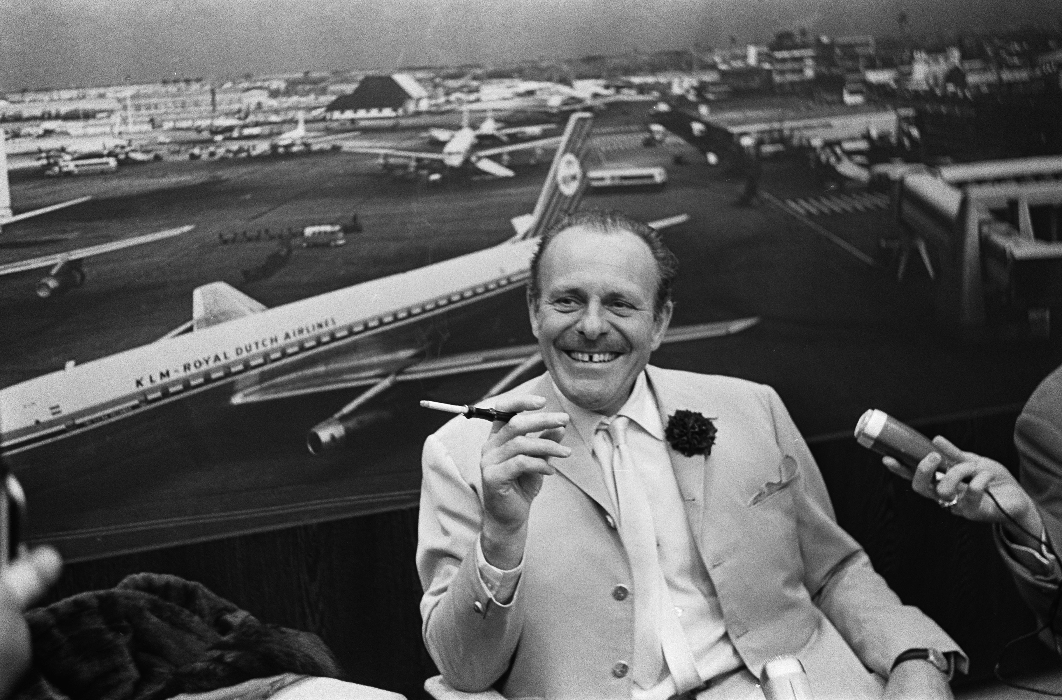 Collectie / Archief : Fotocollectie Anefo Reportage / Serie : [ onbekend ] Beschrijving : Premiere van de film "Knotsgekke kerels in hun vliegende kratten" (Engelse titel "Those Magnificent Men in Their Flying Machines") in Nederland. Terry Thomas tijdens persconferentie op Schiphol Datum : 15 juli 1965 Locatie : Noord-Holland, Schiphol Trefwoorden : acteurs, persconferenties Persoonsnaam : Thomas, Terry Fotograaf : Koch, Eric / Anefo Auteursrechthebbende : Nationaal Archief Materiaalsoort : Negatief (zwart/wit) Nummer archiefinventaris : bekijk toegang 2.24.01.05 Bestanddeelnummer : 917-9689